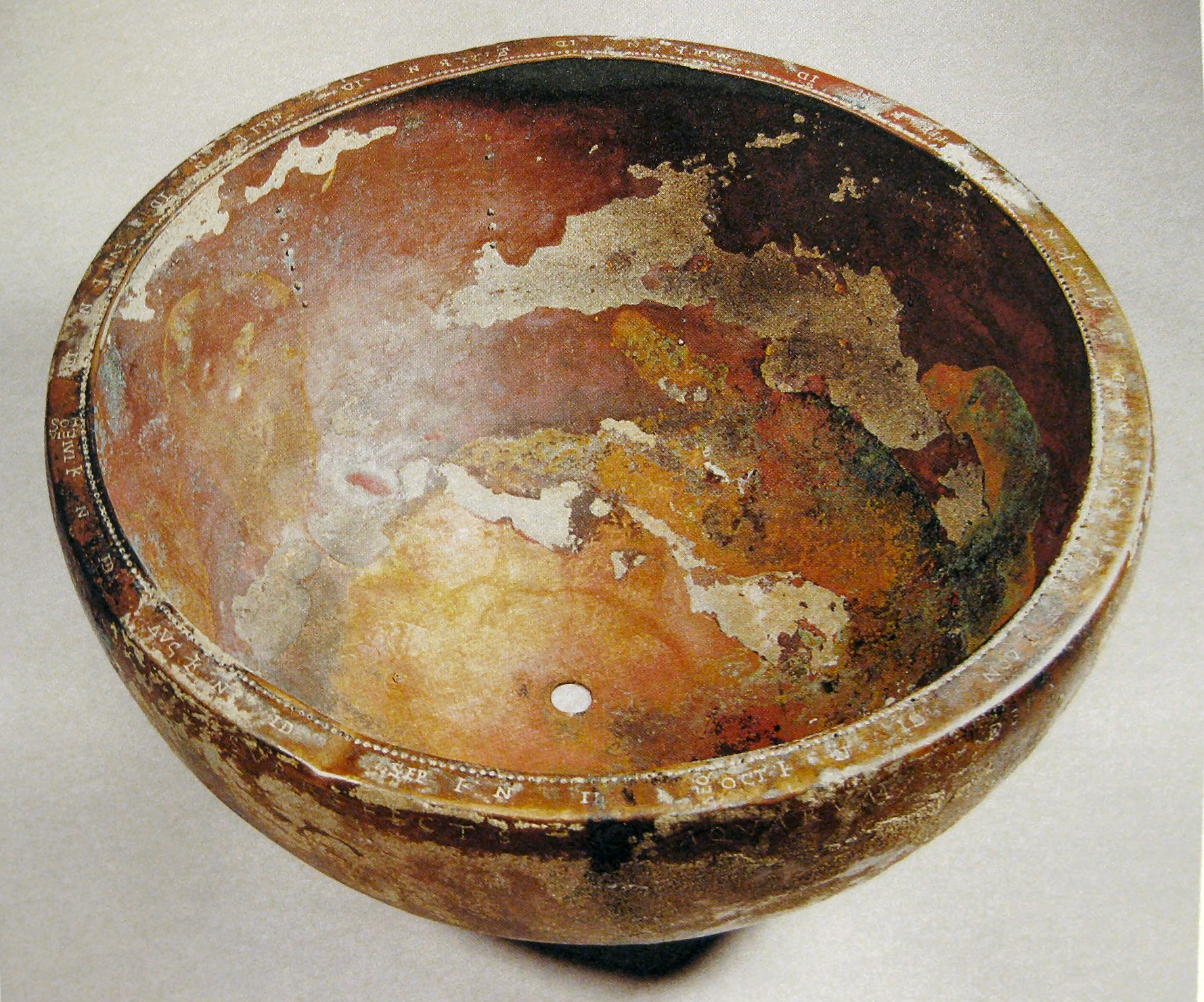 Photo de l'horloge hydraulique de Francfort, Musée archéologique de Francfort-sur-le-Main.